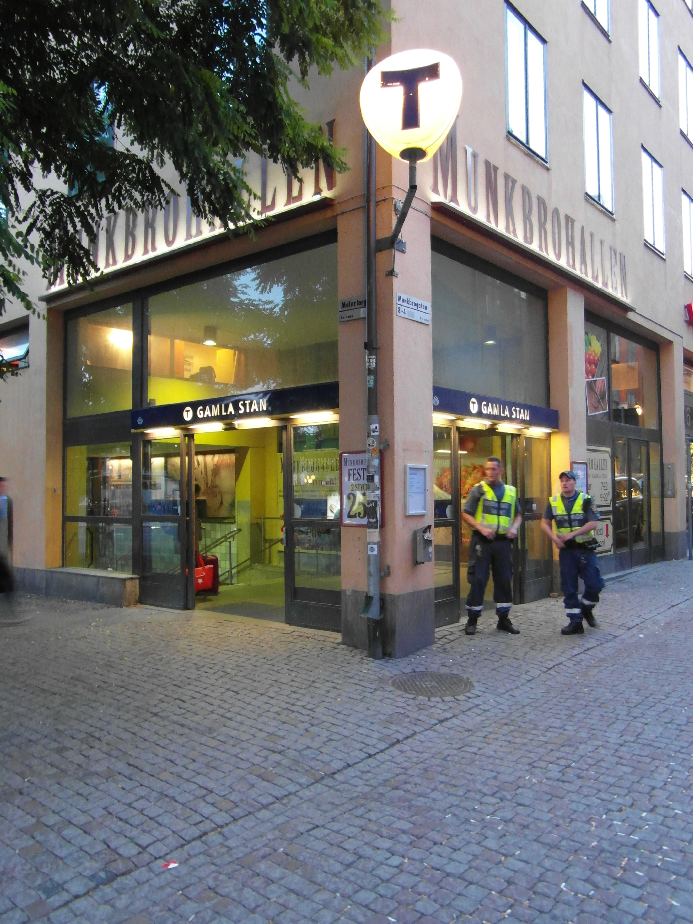 Röda linjen - T13 - T14 Gröna linjen - T17 - T18 - T19